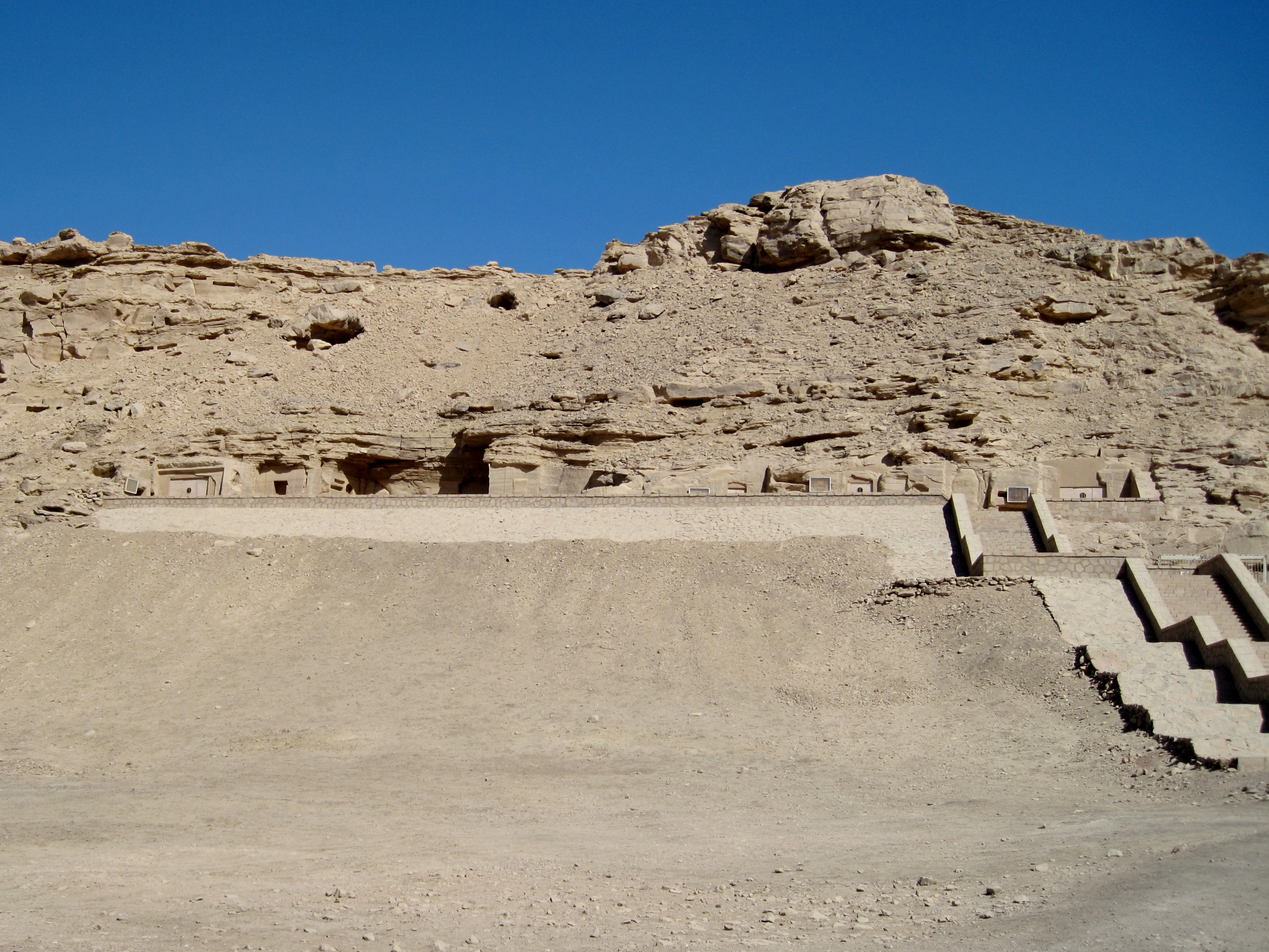 Felsengräber des altägyptischen Necheb bei el-Kab, Ägypten